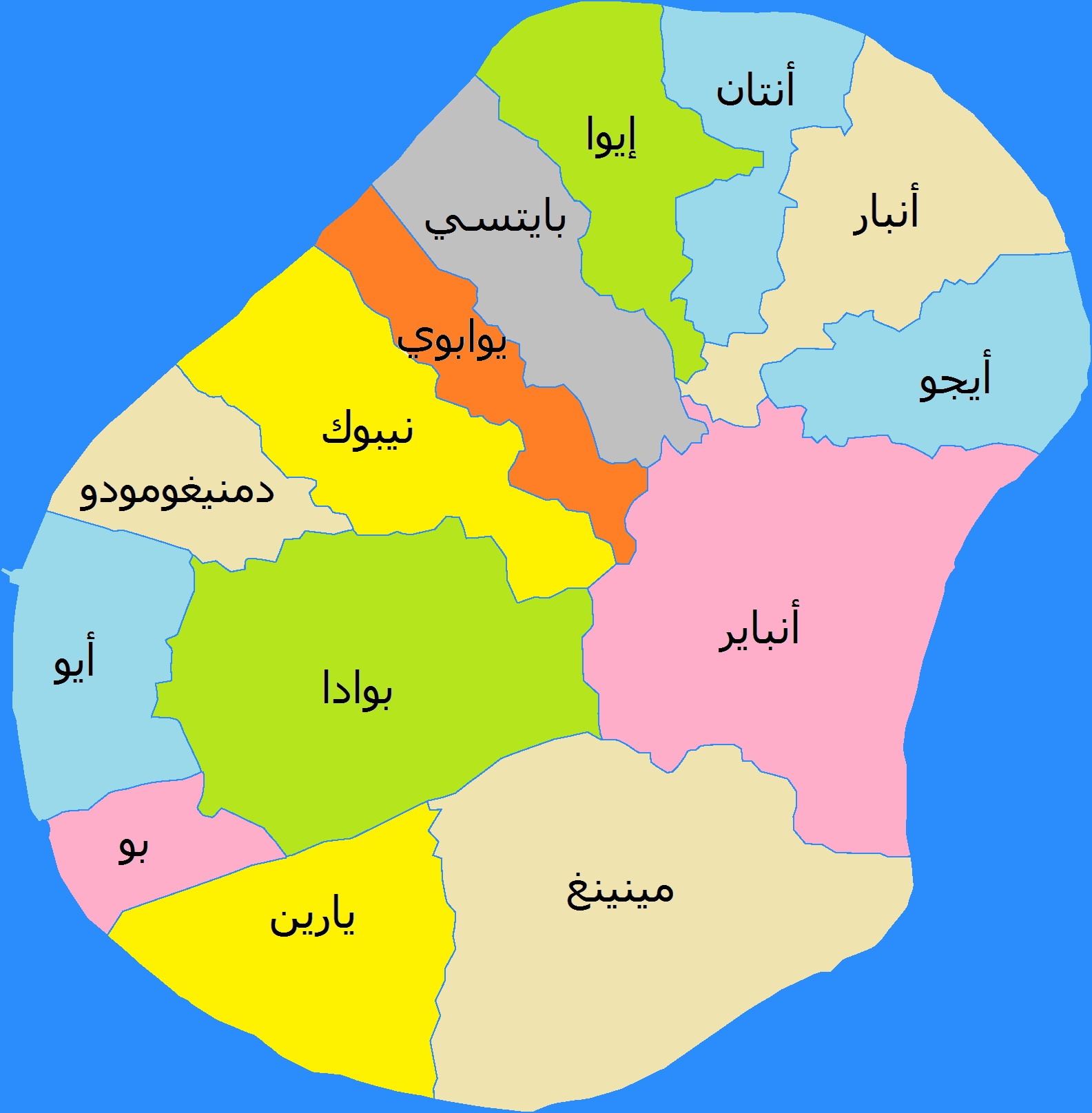 ضواحي ناورو